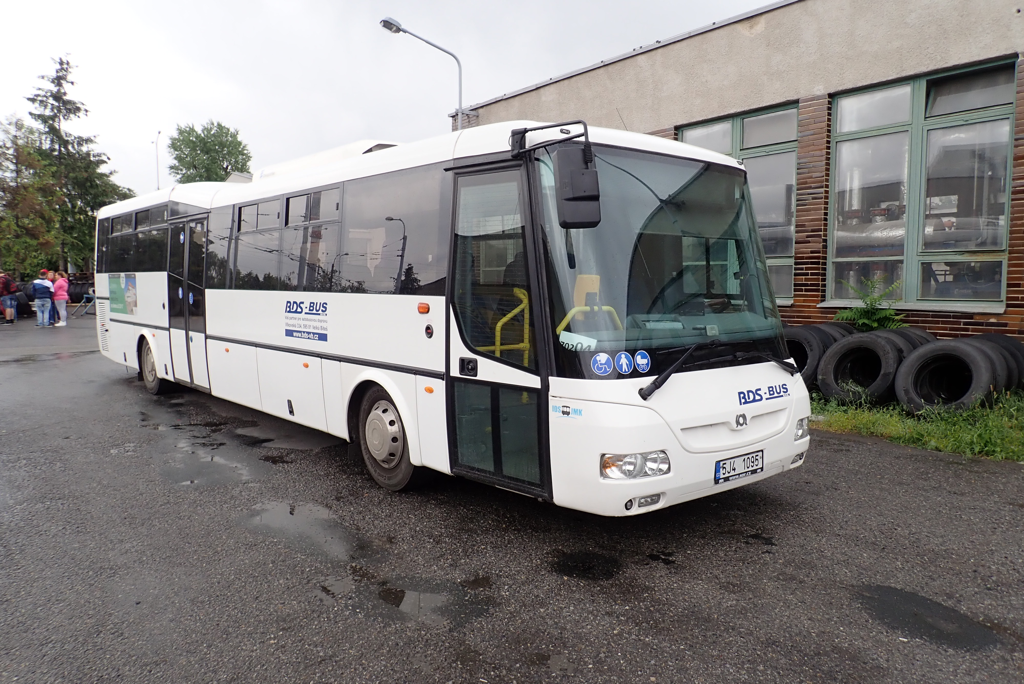 SOR CN 12 ve vozovně Slatina